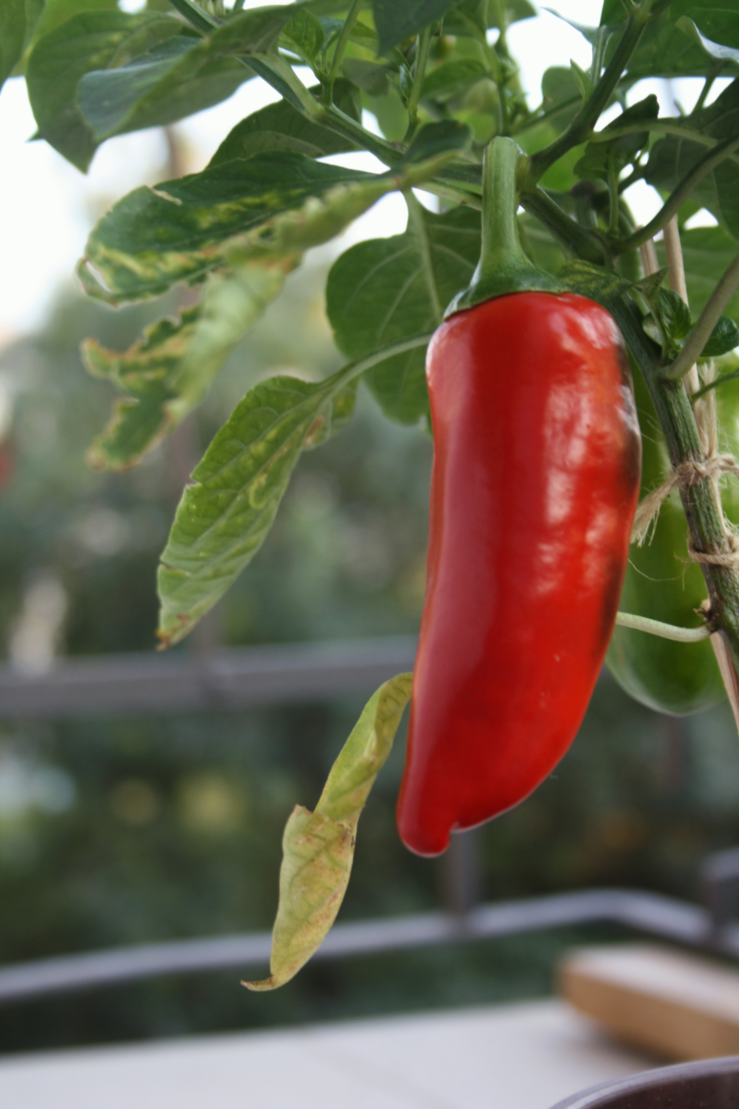 Paprika, průběh zrání